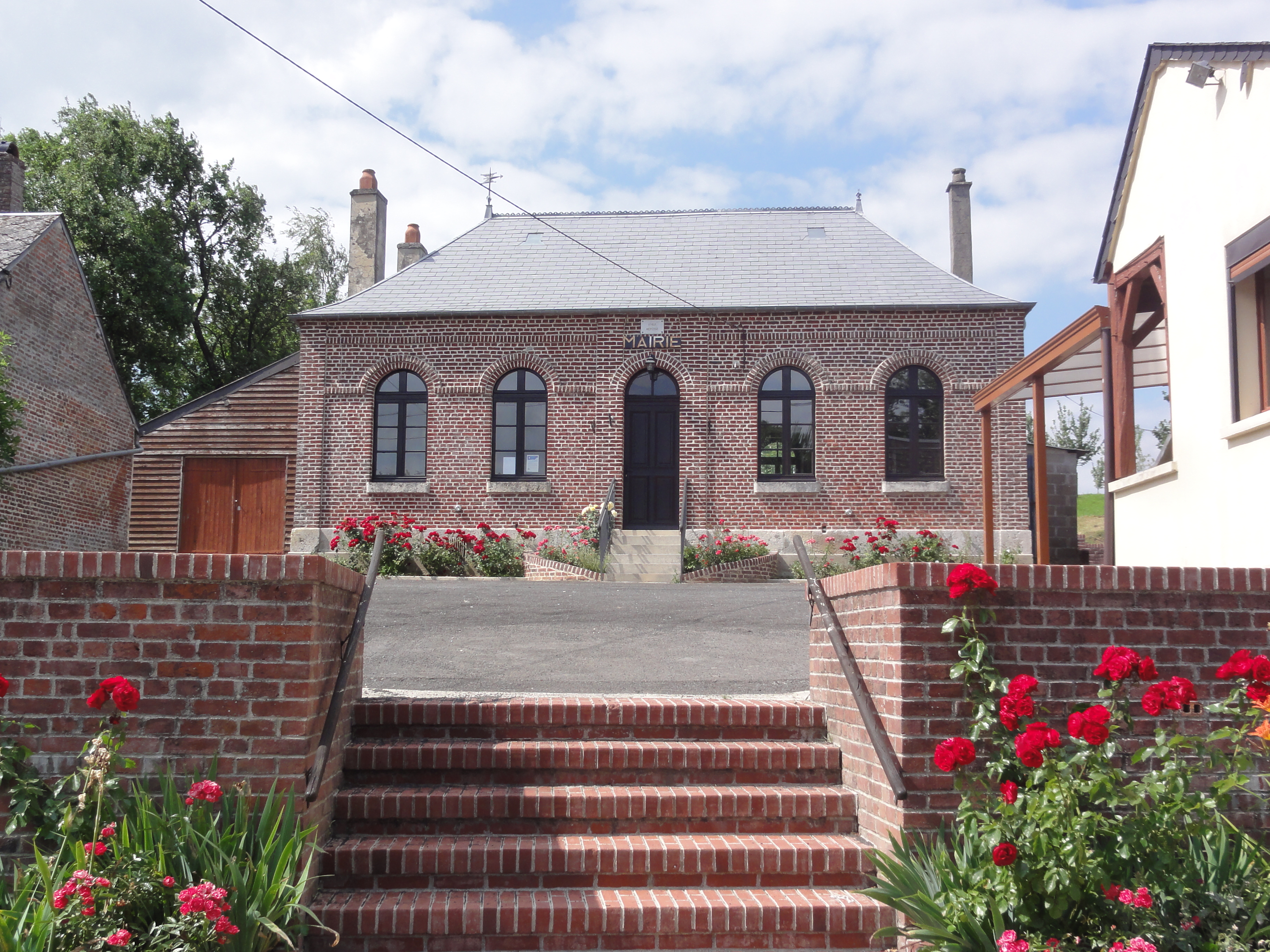 Coingt (Aisne) mairie